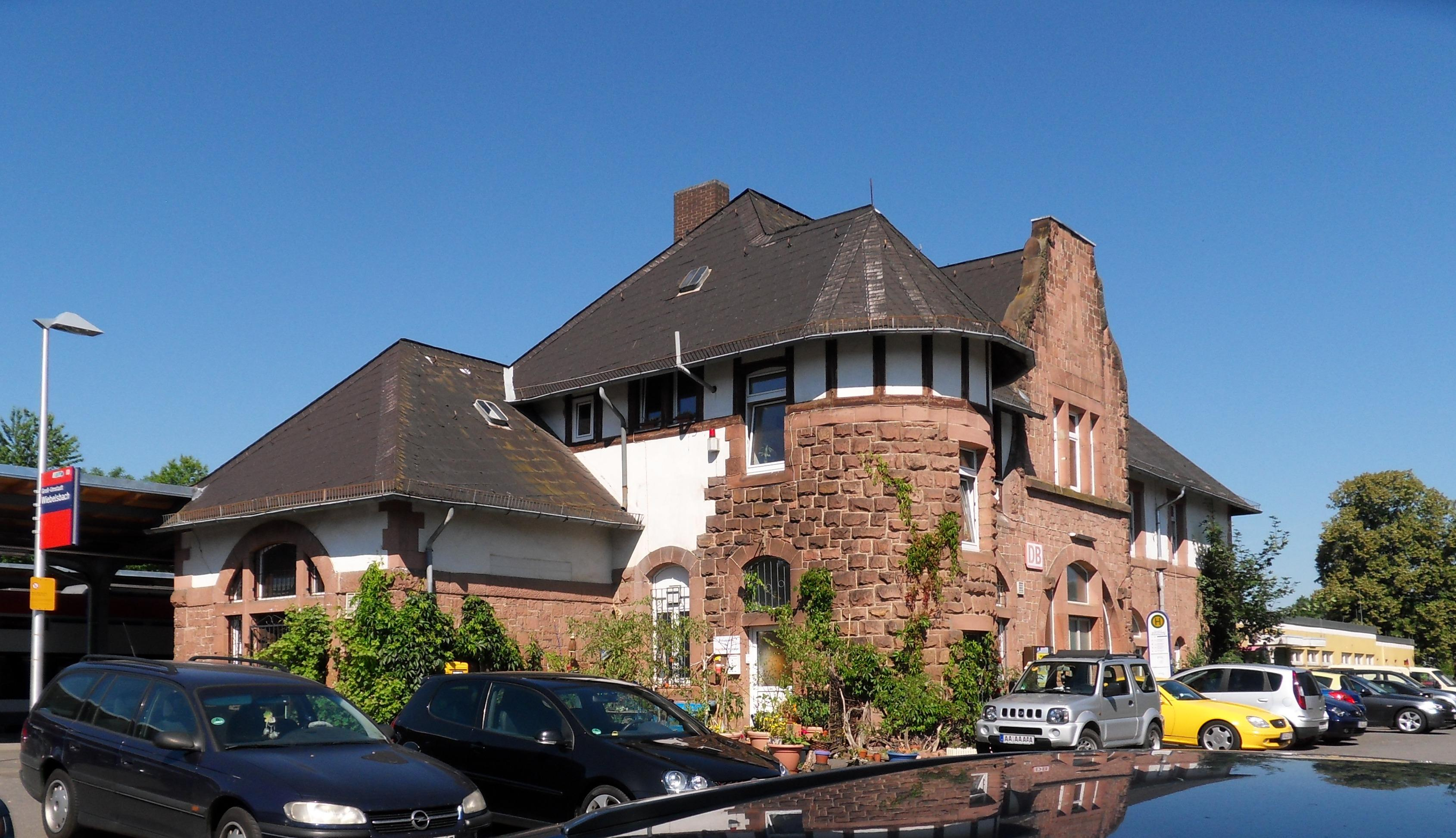 Das Bahnhofsgebäude von Groß-Umstadt Wiebelsbach, dem zentralen Knotenpunkt der Odenwaldbahn